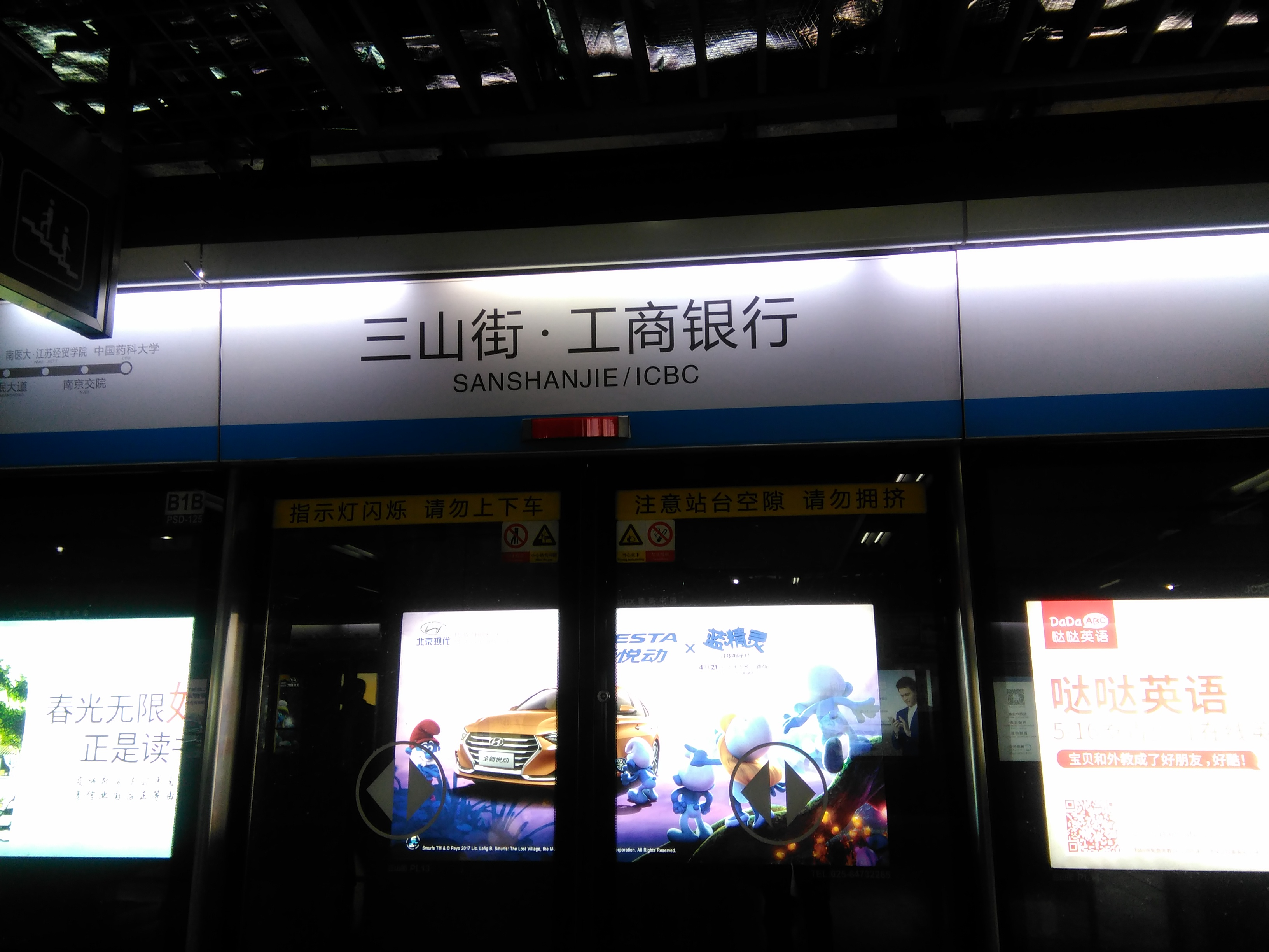 三山街地铁站。